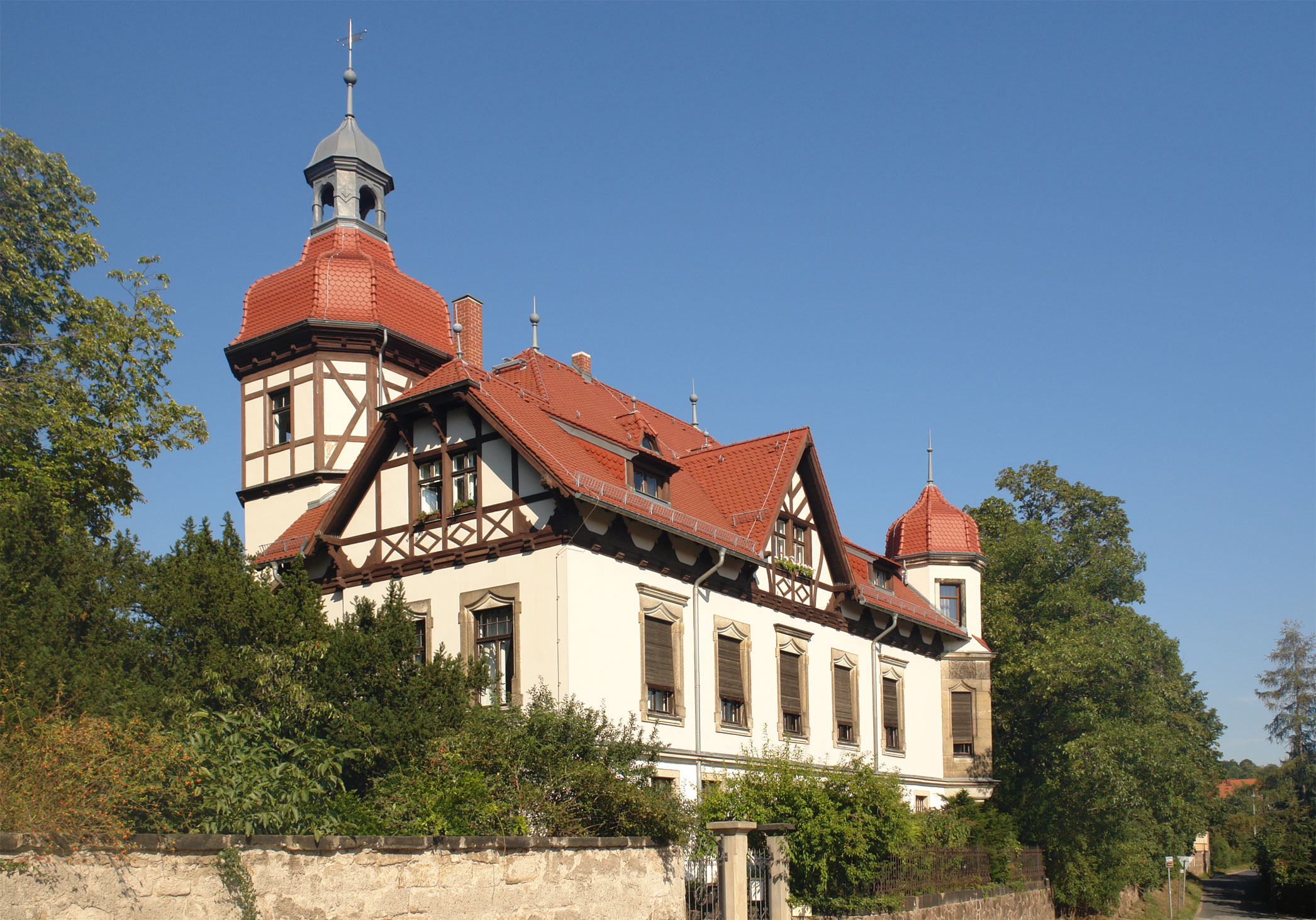 Pfad+Objekt: Deutschland / Sachsen_BL / Dresden_RB / Meißen_Lk / Radebeul - Zitzschewig: Krapenburg. Tags: Westlausitzer Hügel- und Bergland ; S82 ; Bauwerk Gebäude Herrenhaus